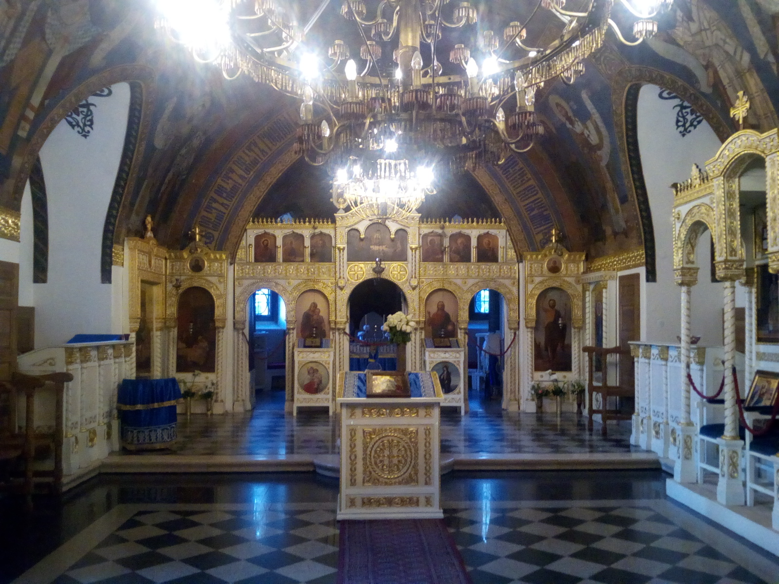 Interno della Chiesa Ružica a Belgrado